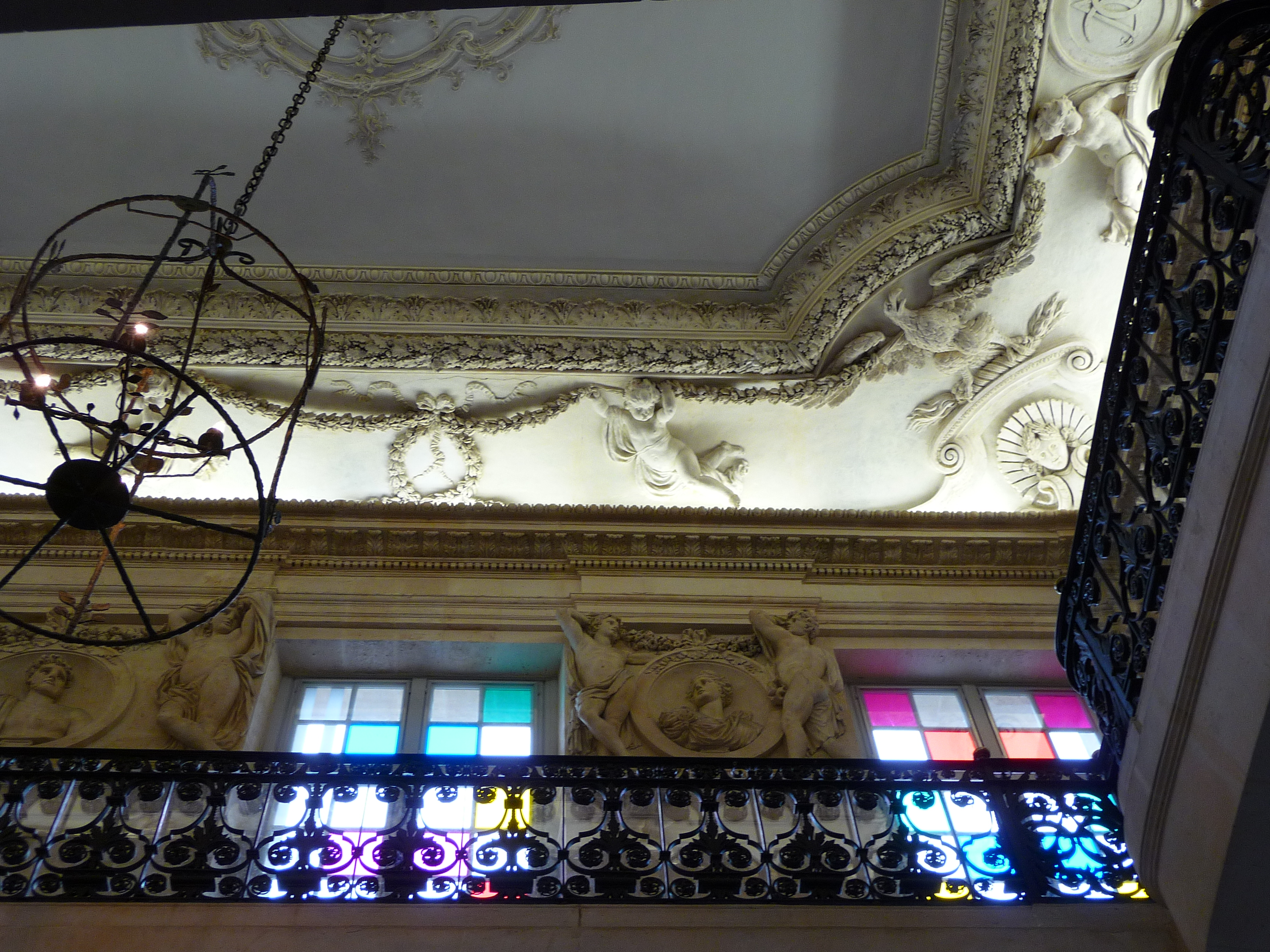 Le plafond de l'entrée principale à l'Hôtel Salé (musée Picasso) à Paris.